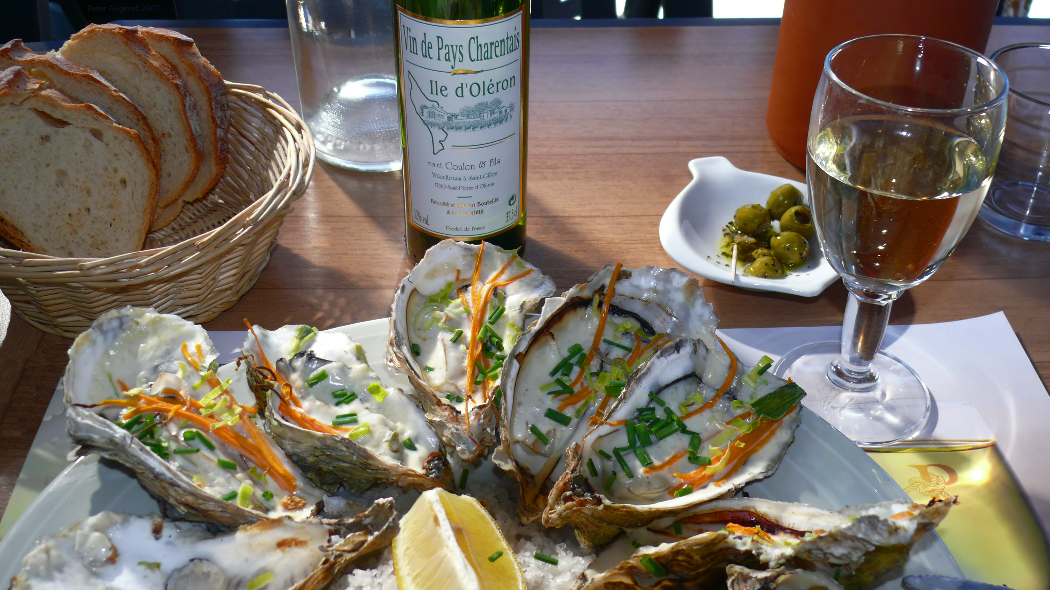 Oysters at Île d'Oléron